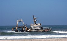 حطام سفينة Zelia India جنوب خليج Henties ، نوفمبر 2014